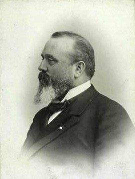 Georg Bestle (1855-1933), grosserer og etatsråd.